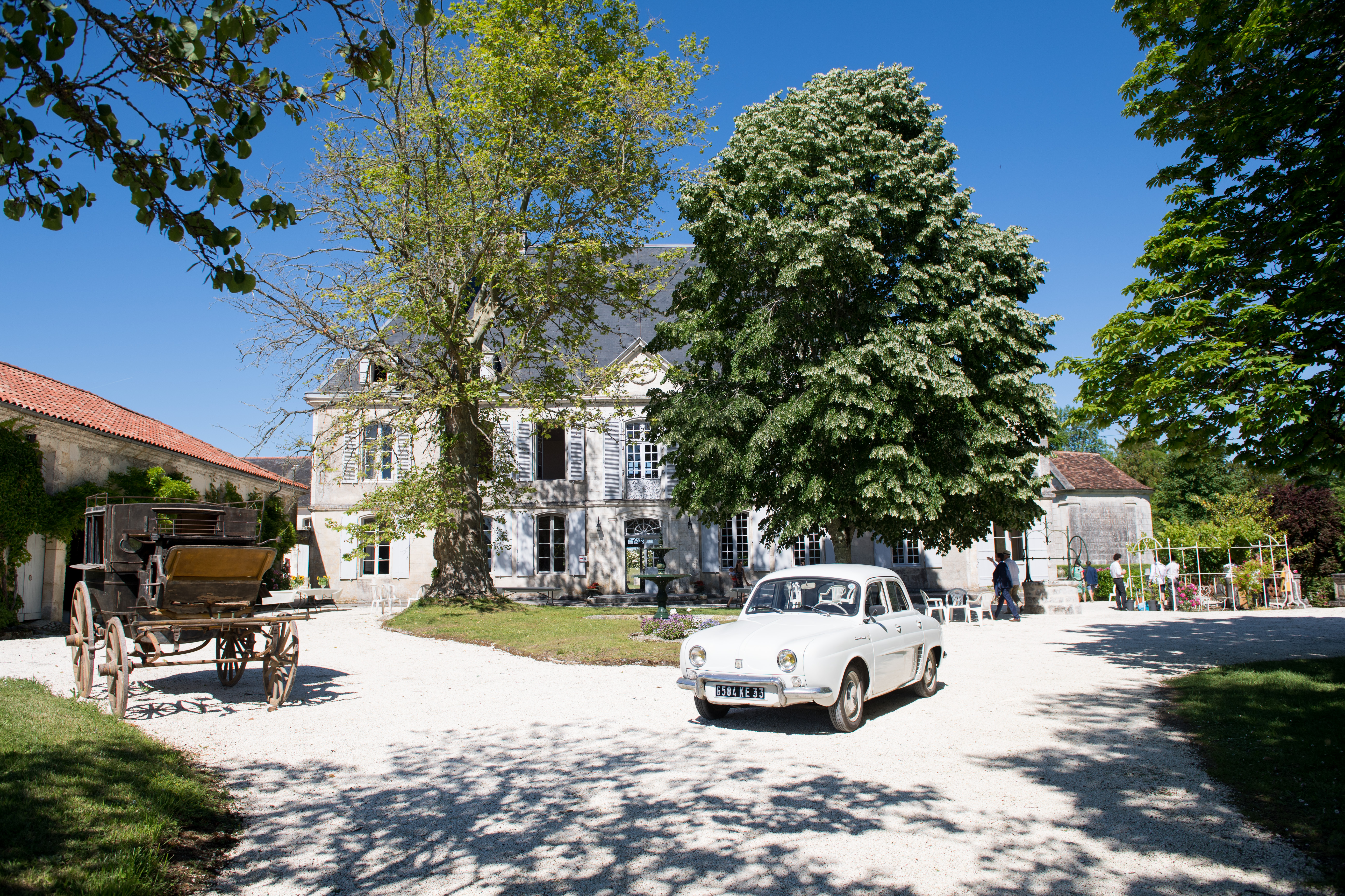 Photo lors d'un mariage